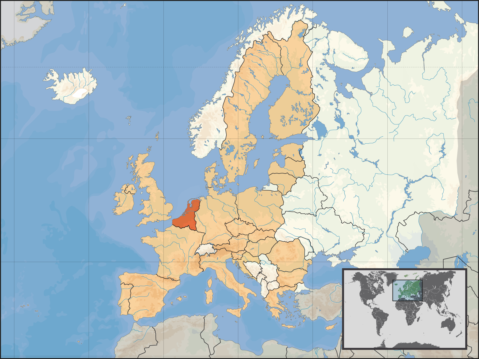 De ligging van Heel-Nederland in Europa.